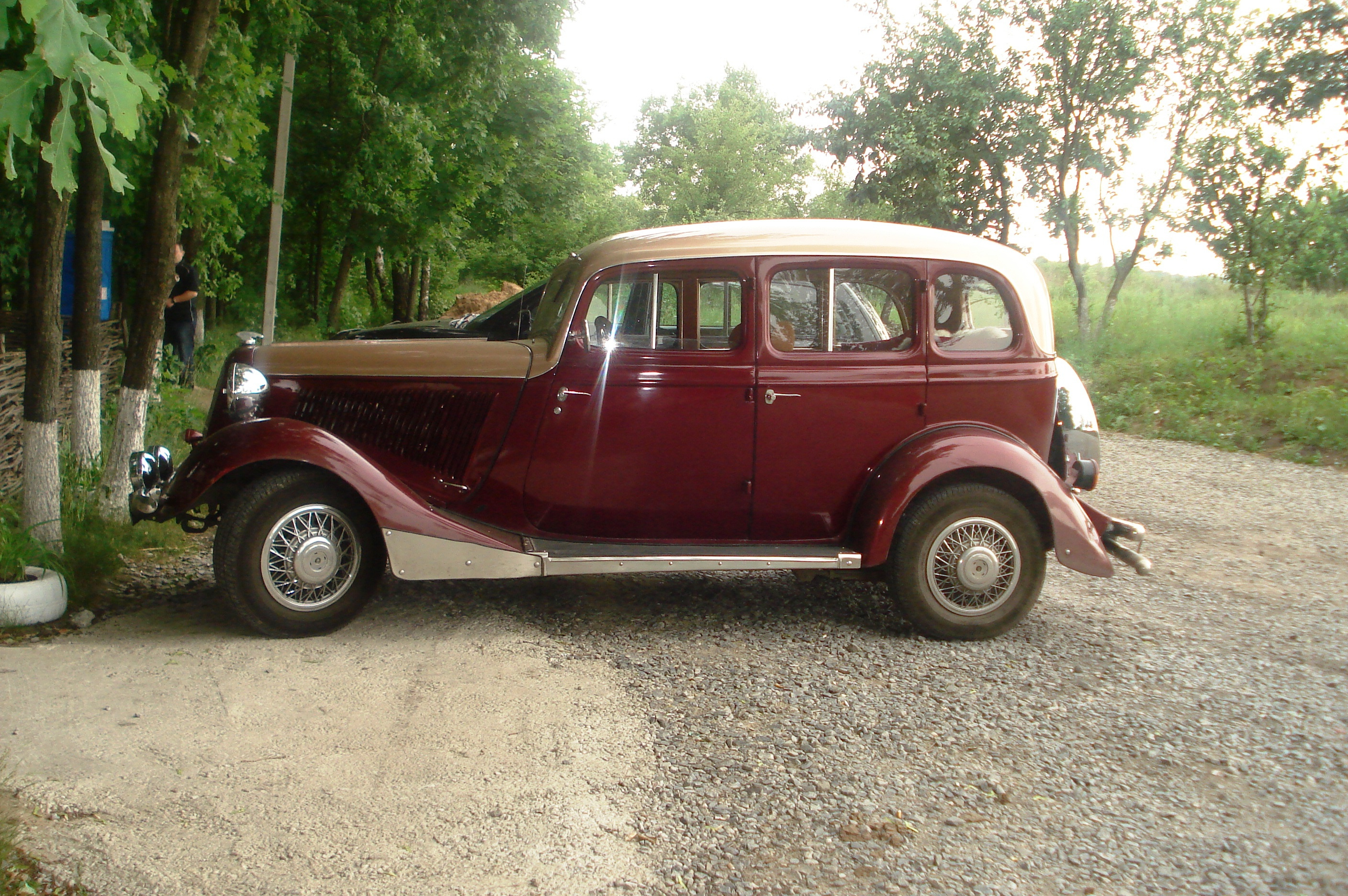 Отреставрированный ГАЗ М1